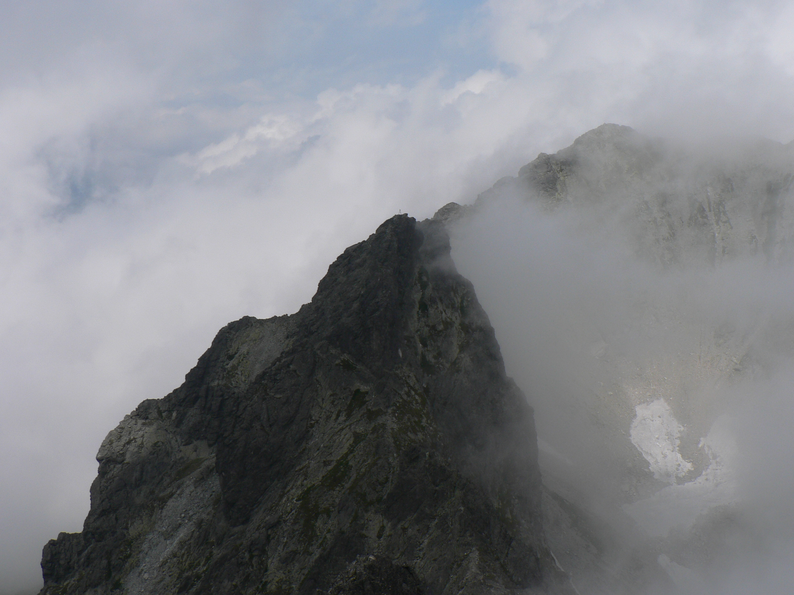 Dzika Turnia i Świstowy Szczyt z Małej Wysokiej